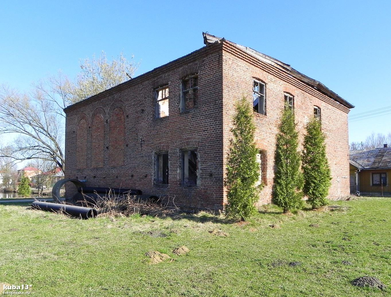 Synagoga w Starym Dzikowie. Póki służyła jako kino i dom kultury jeszcze się jakoś trzymała. W 2005 r. dach jeszcze chronił wnętrze. W kwietniu 2012 r. dachu już nie ma.